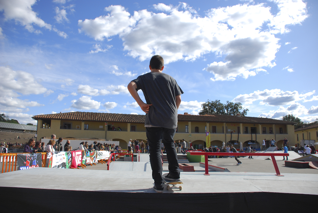 Skateboarder, Festival della Creatività 2009, Florence, Italy.